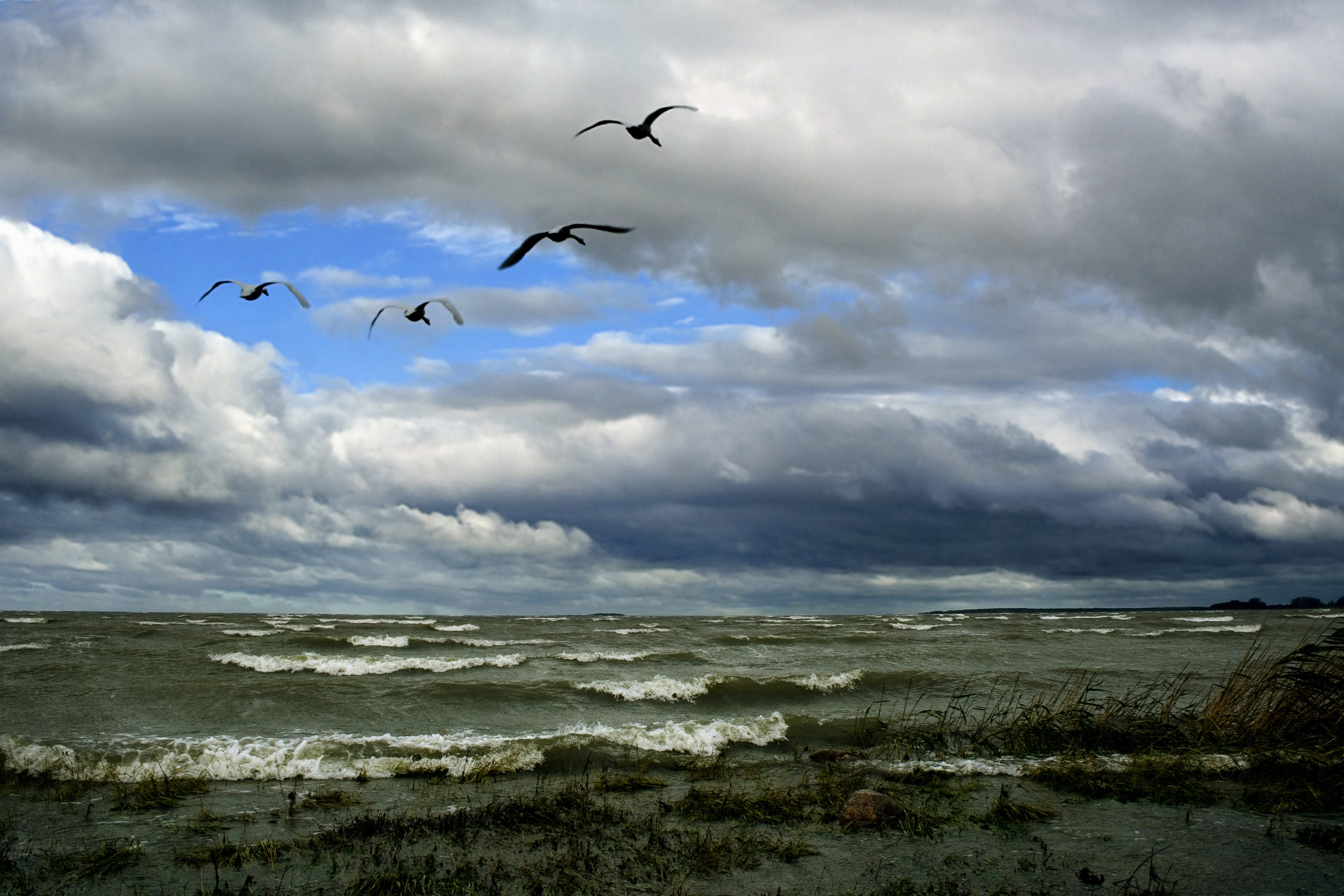 Luiged Matsalu lahel